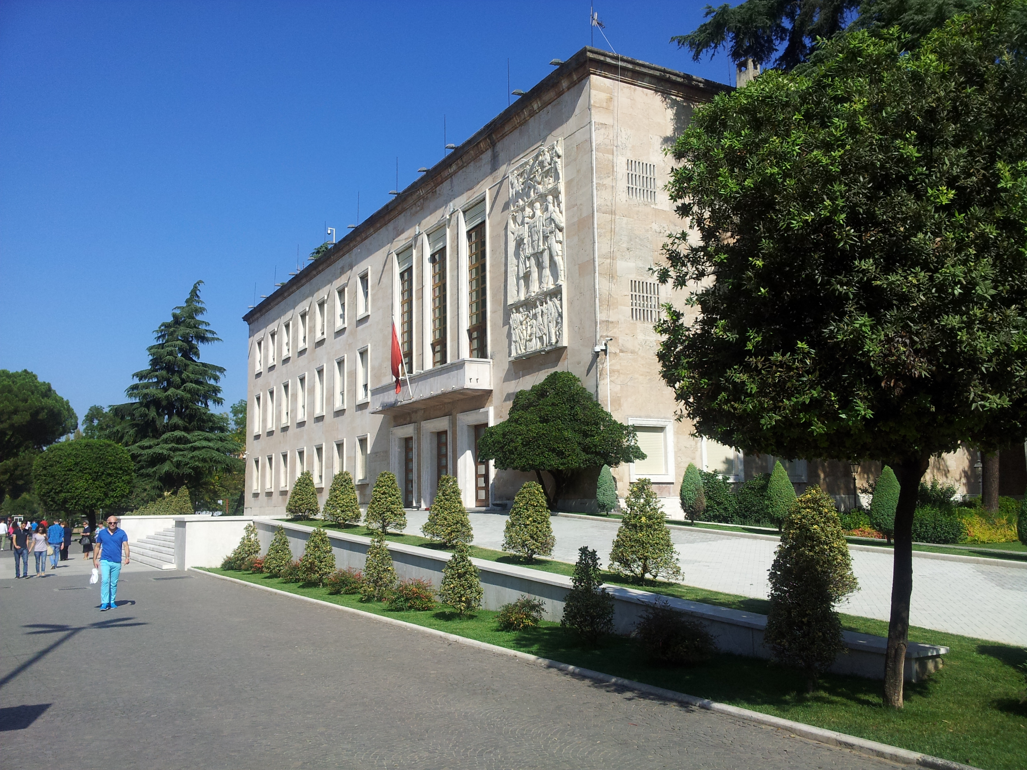 Kryeministria, Tirane. Pamje nga Bulevardi kryesor.